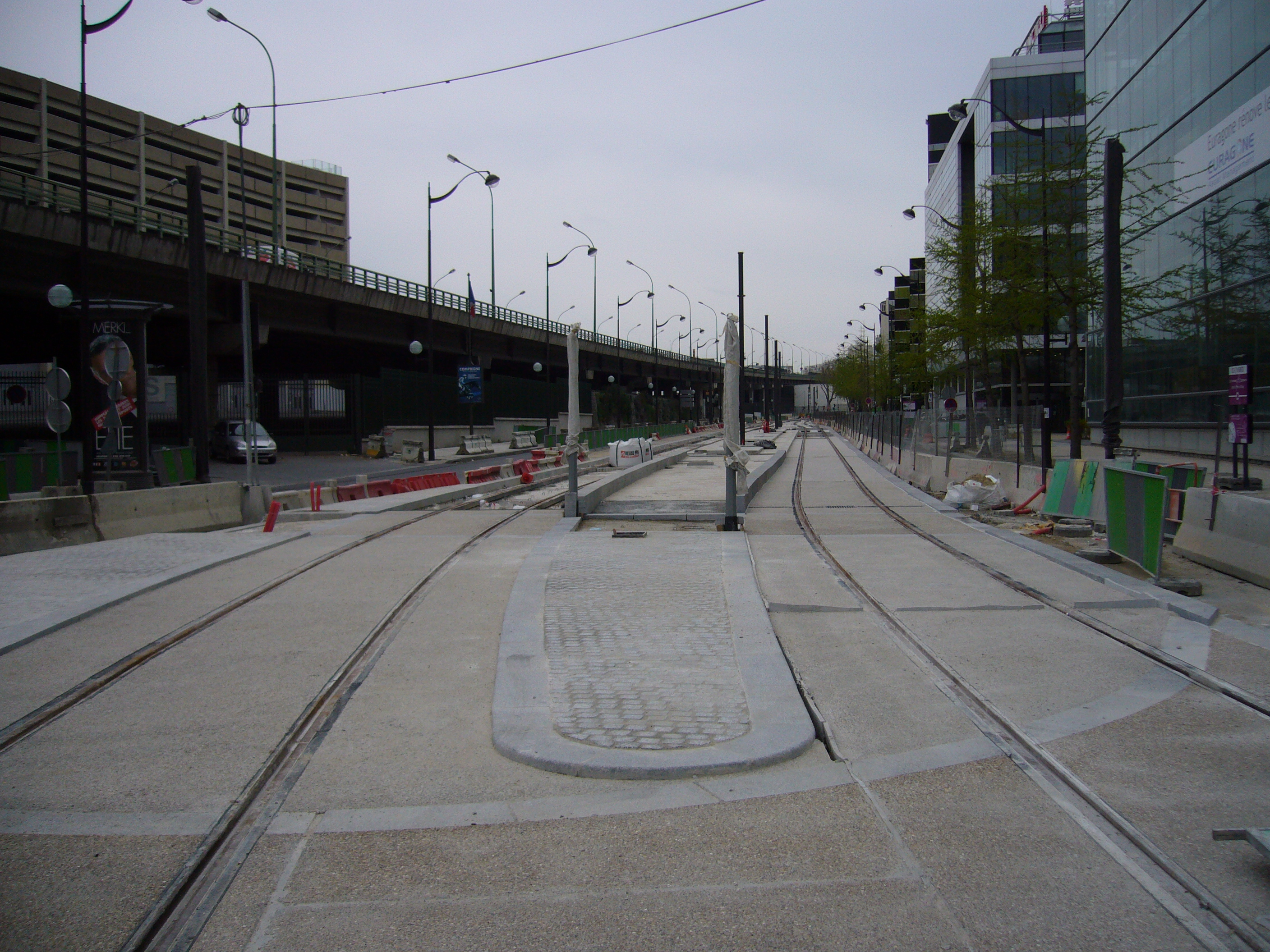 Vue de la station Porte d'Issy pendant les travaux de prolongement de la ligne 2 du tramway d'Île de France à la Porte de Versailles rue d'Oradour-sur-Glane.